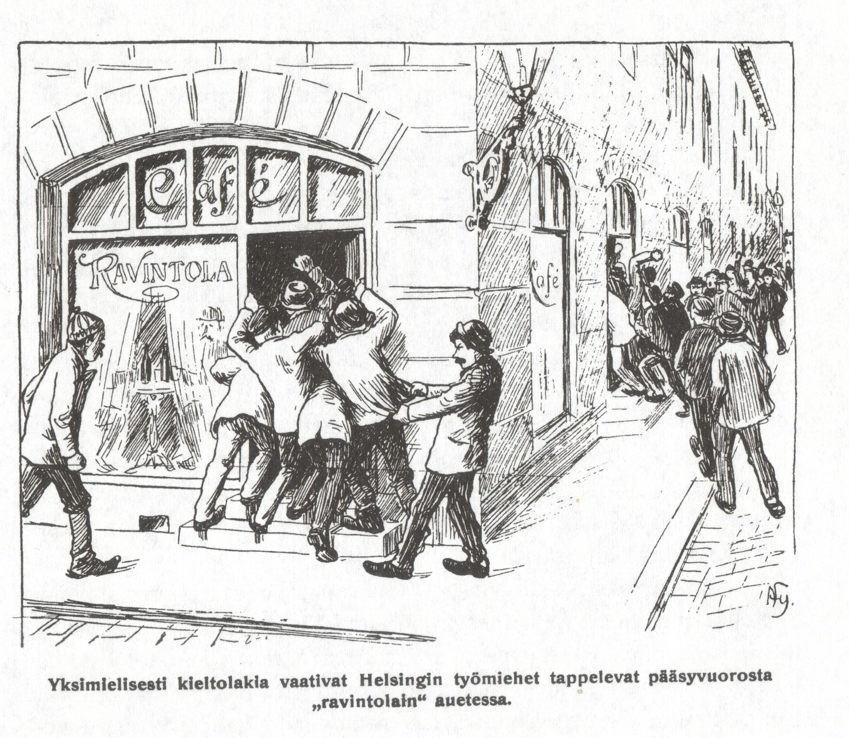 Pilakuva kieltolain kannattajista, julkaistu Velikulta-pilalehdessä.